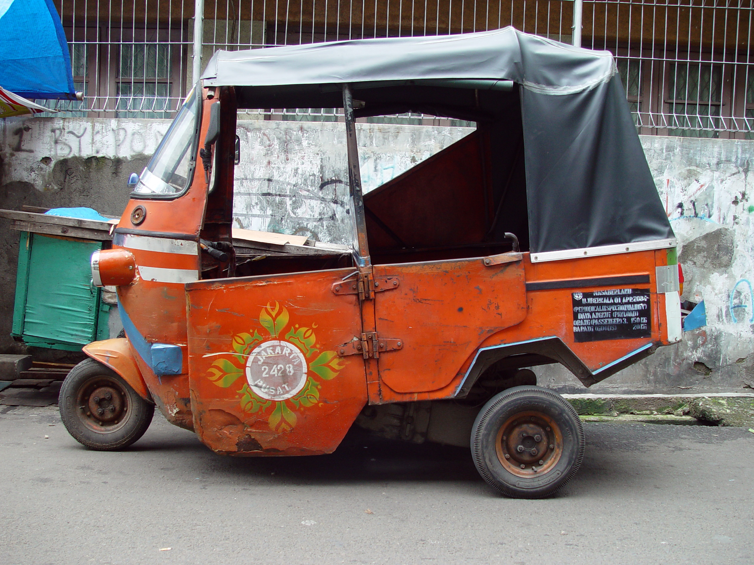 Bajaj, Jakarta Indonesia.